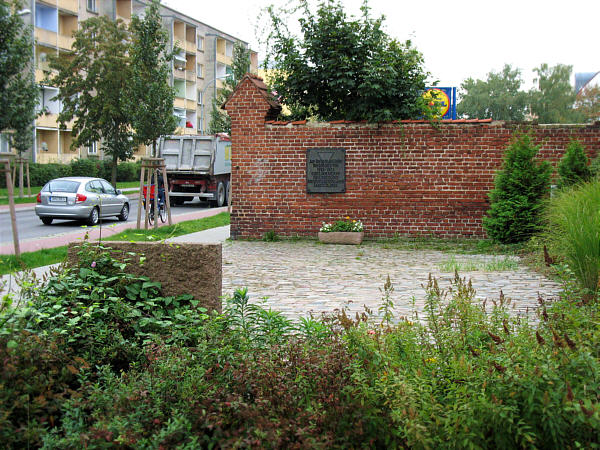 KZ Oranienburg